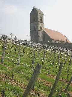 Village de Saint-Dizier l'Evêque, Territoire de Belfort, l'église et le vignoble.